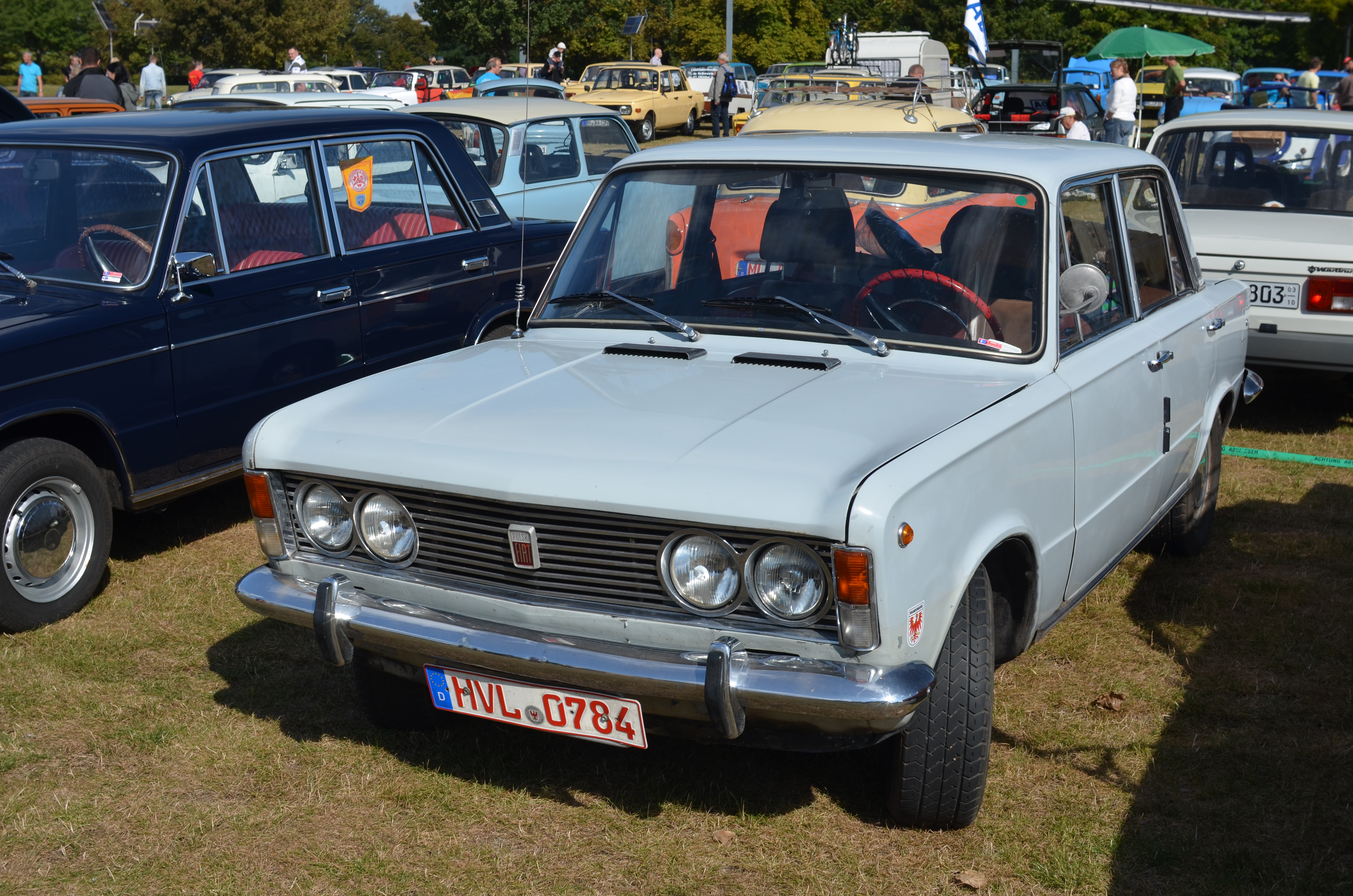 Polski Fiat